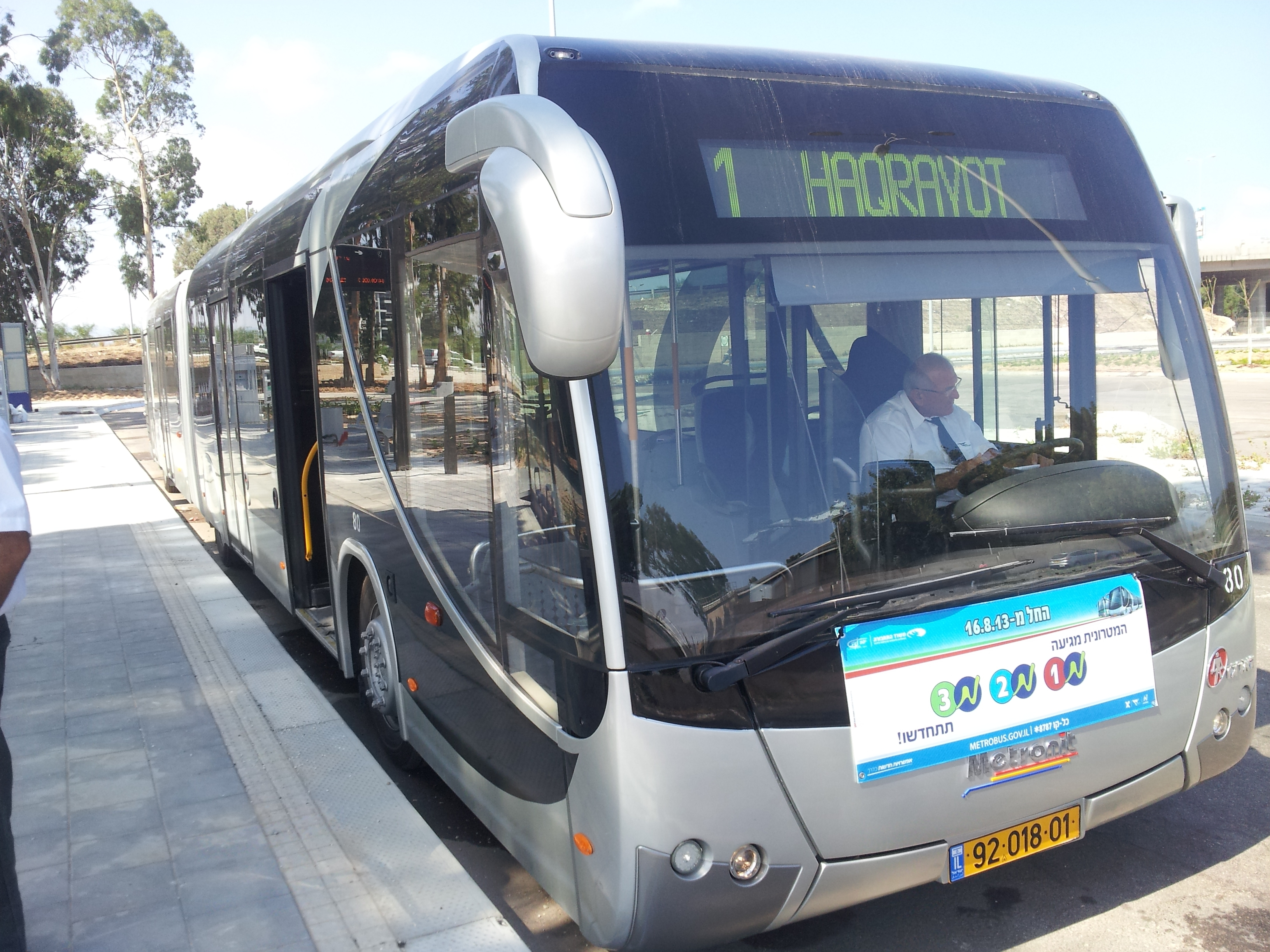 המטרונית בנסיעת הרצה, תחנת מרכזית הקריות, אוגוסט 2013